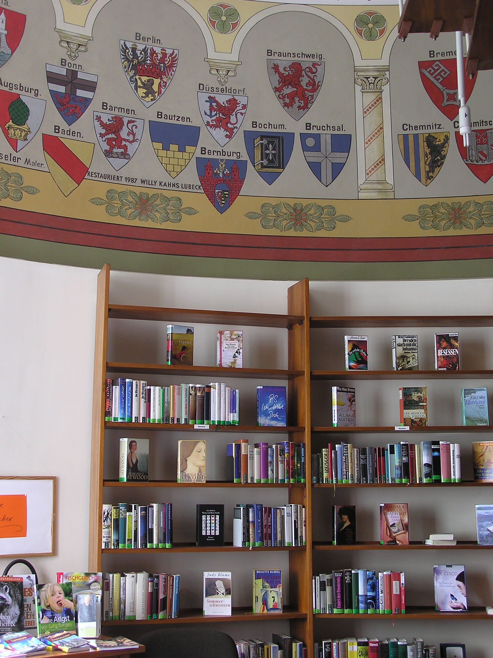 Aumühle,Bismarckturm:Wappen Fries 1.Stock